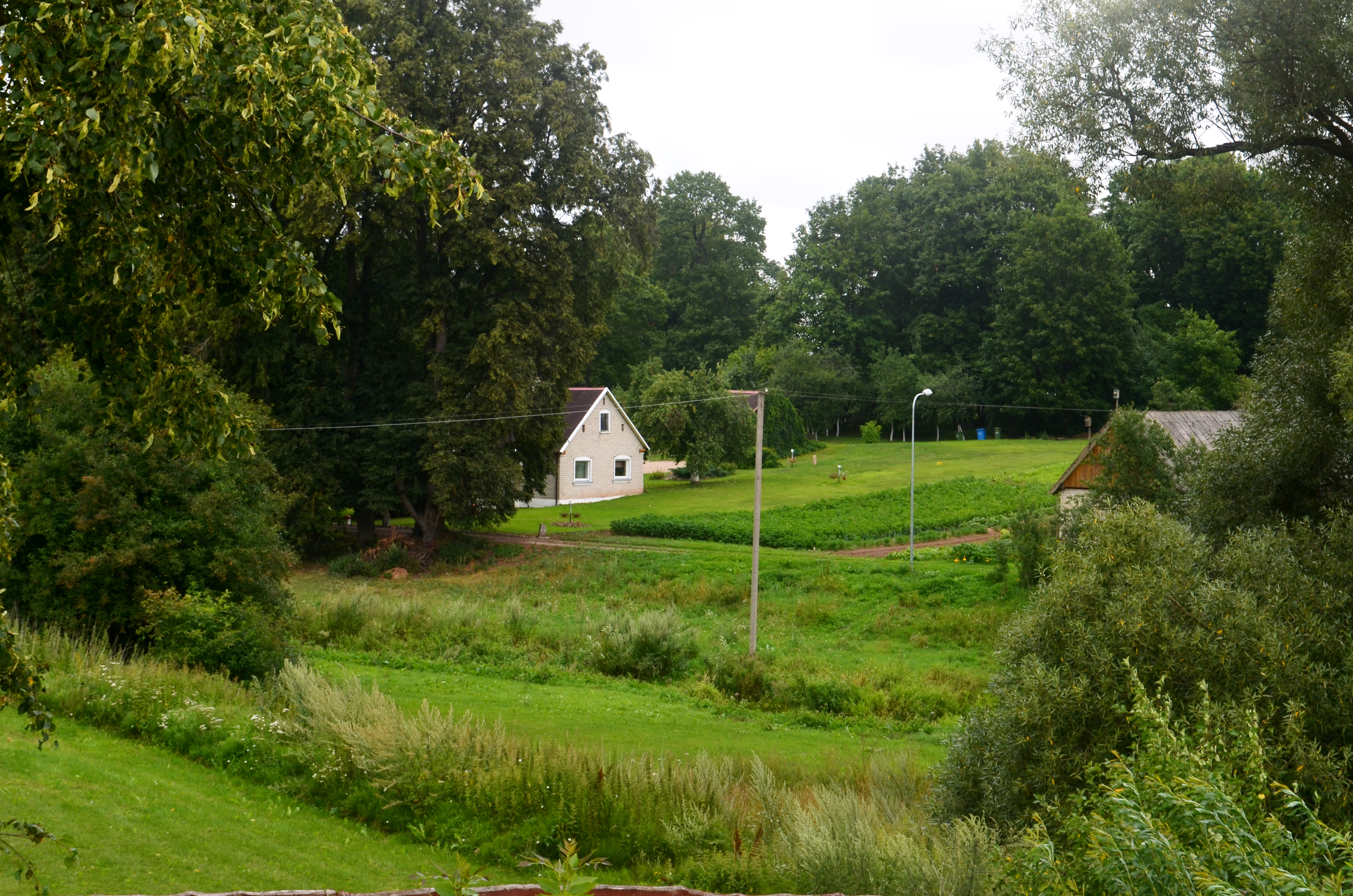 Martyniškis, Jonavos raj.